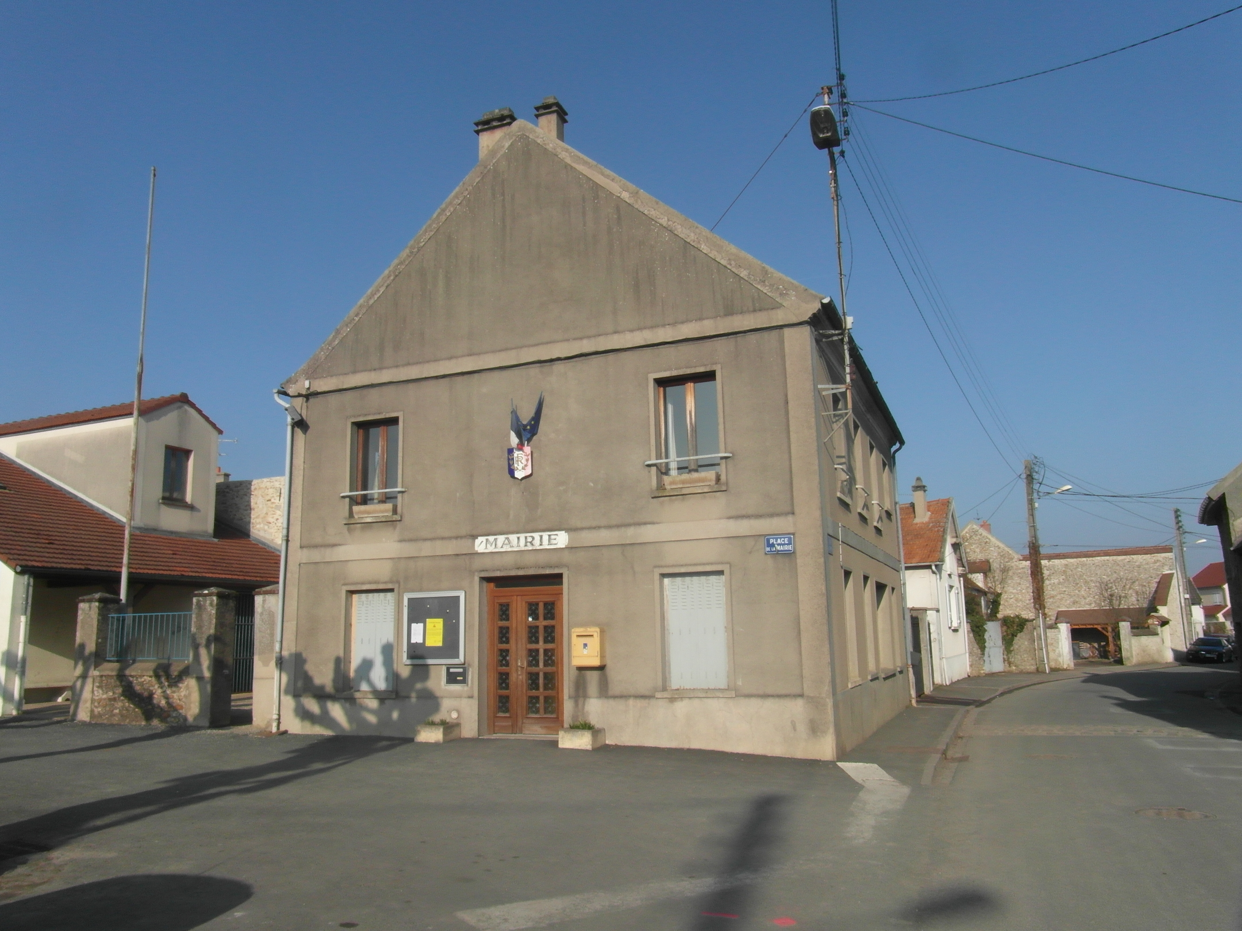 Mairie de Solers (Seine-et-Marne)